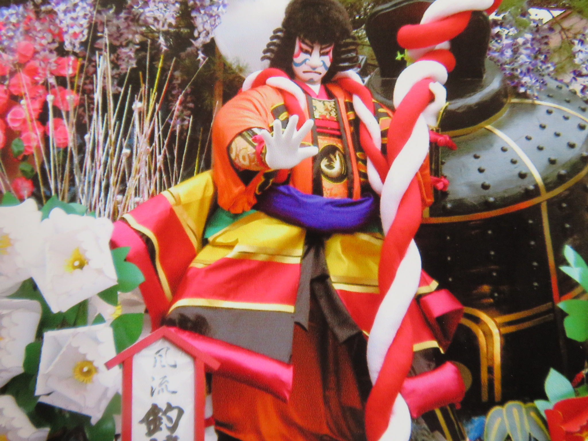 一戸・橋中組山車。